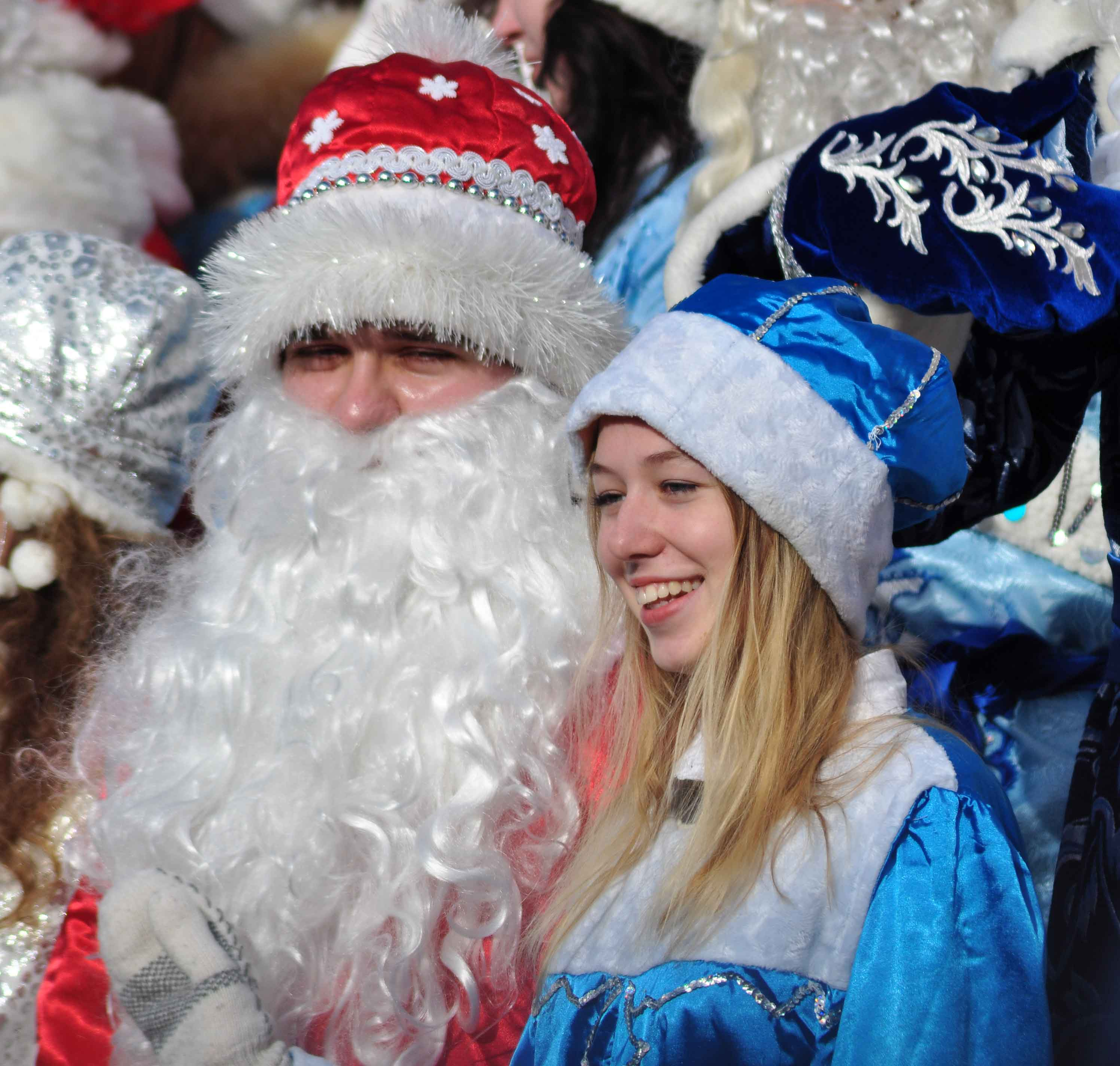 Парад Дед-Морозов и снегурочек и рок-концерт в Сочи 2016